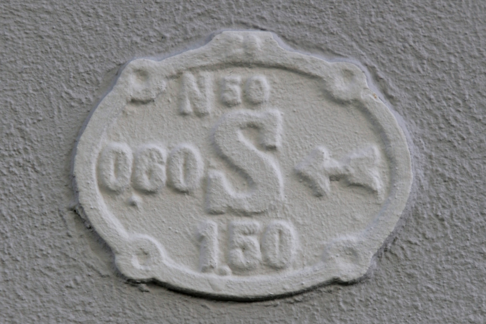 Altes Schieberschild, Bahnstraße 40, Mülheim an der Ruhr